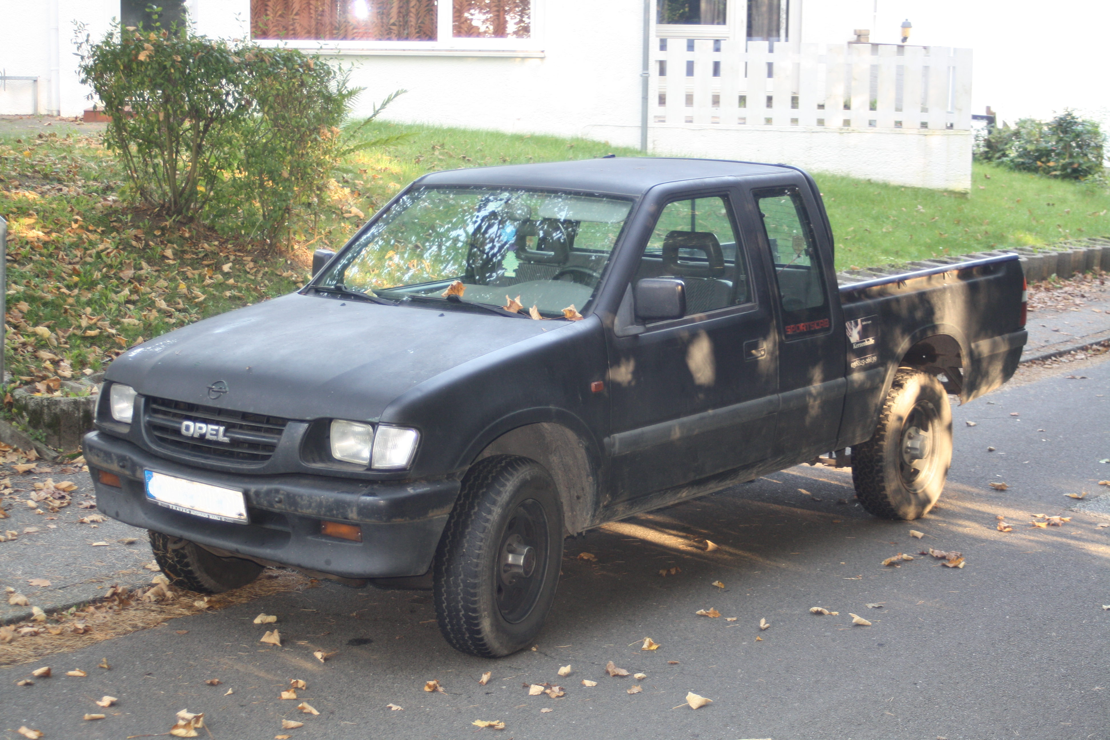 Opel Cambo